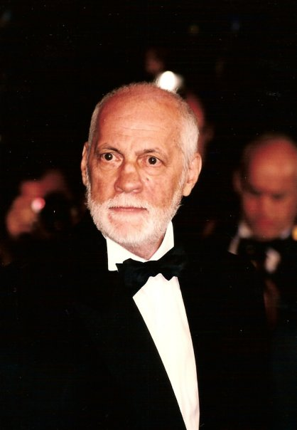 Michel Serrault au festival de Cannes